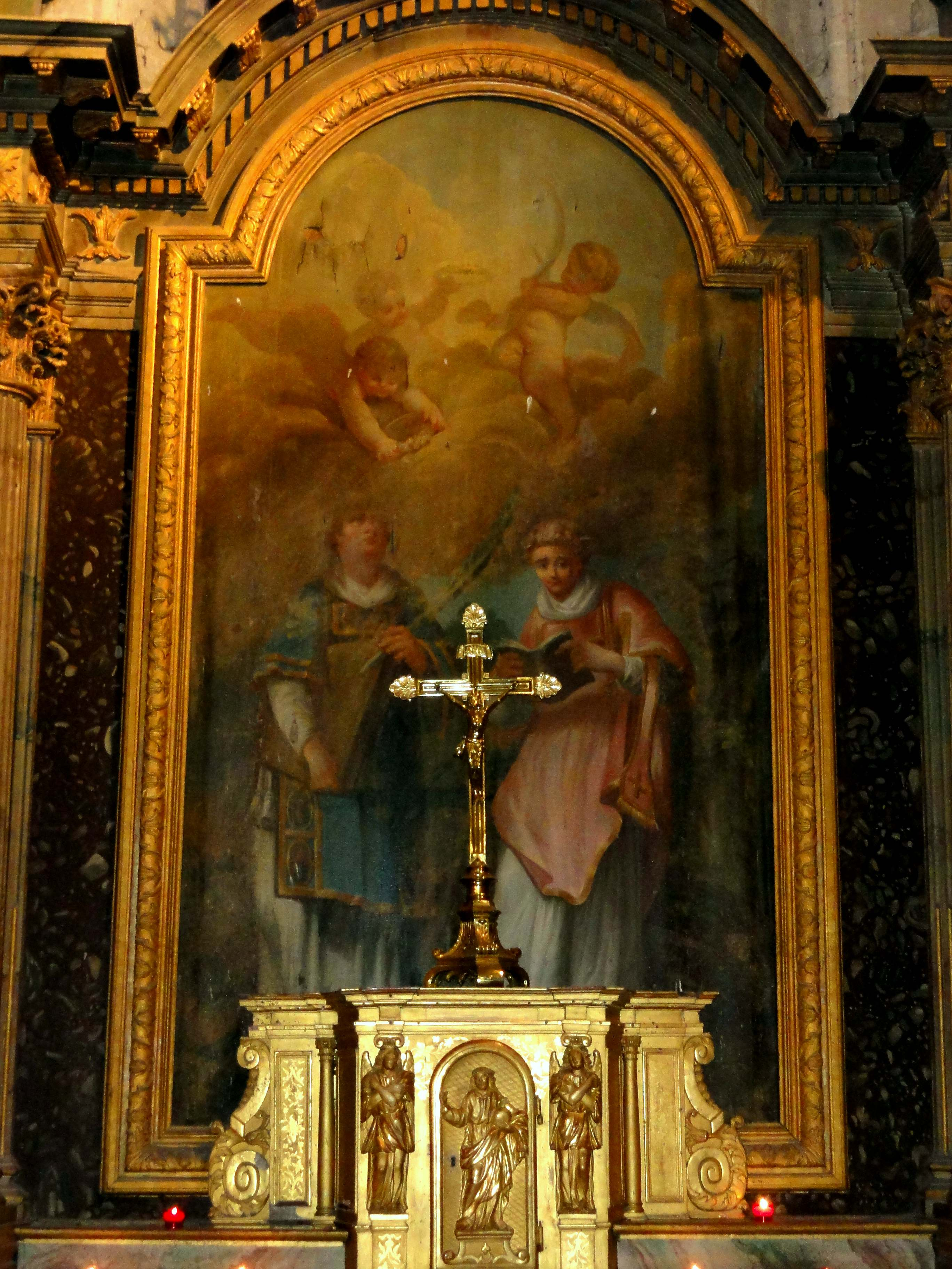 Mobilier de l'église (voir titre).